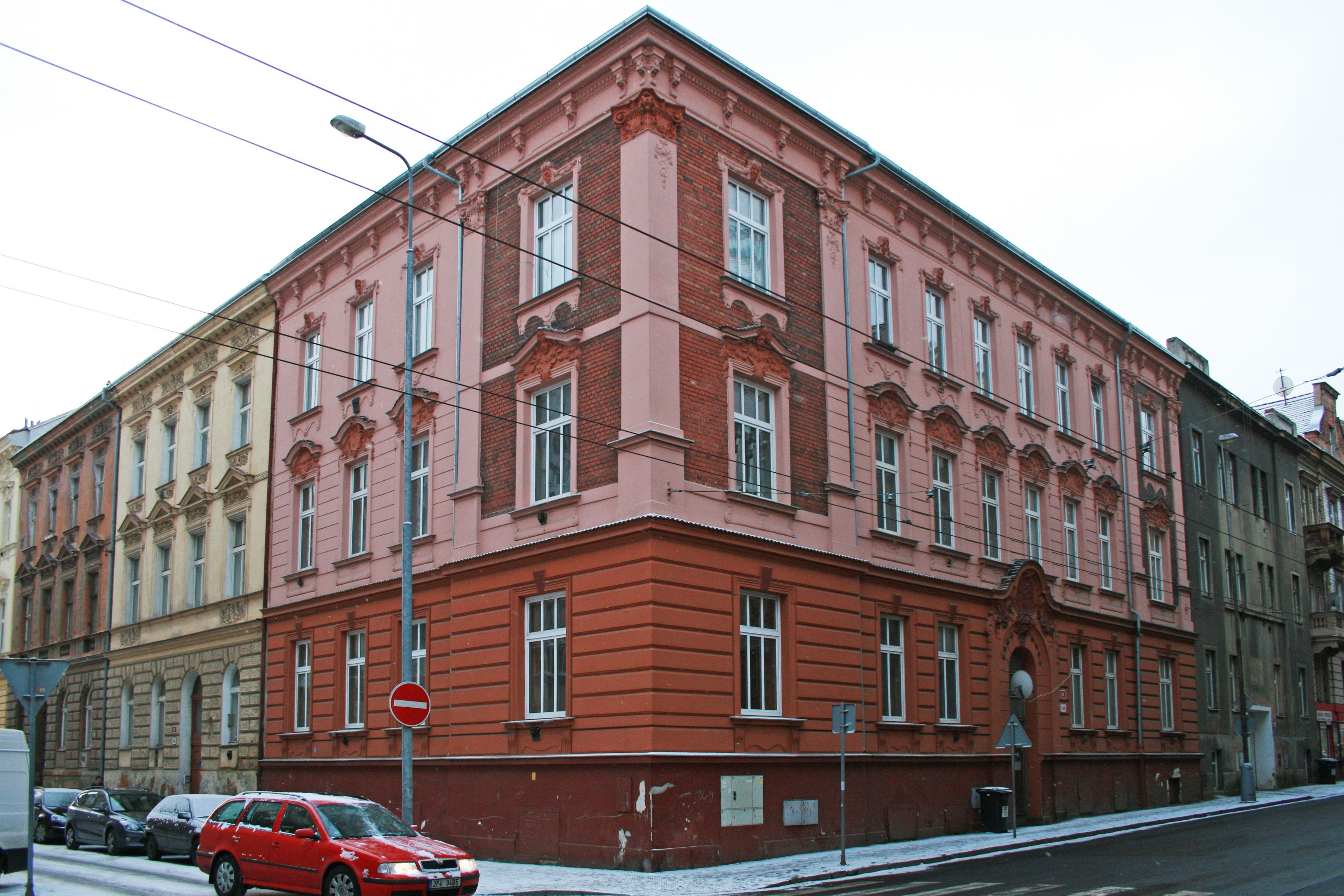 Dům Koperníkova 1146/43, Plzeň 3-Jižní Předměstí, kde od roku 1936 do roku 1942 bydlela rodina Věry Kohnové.